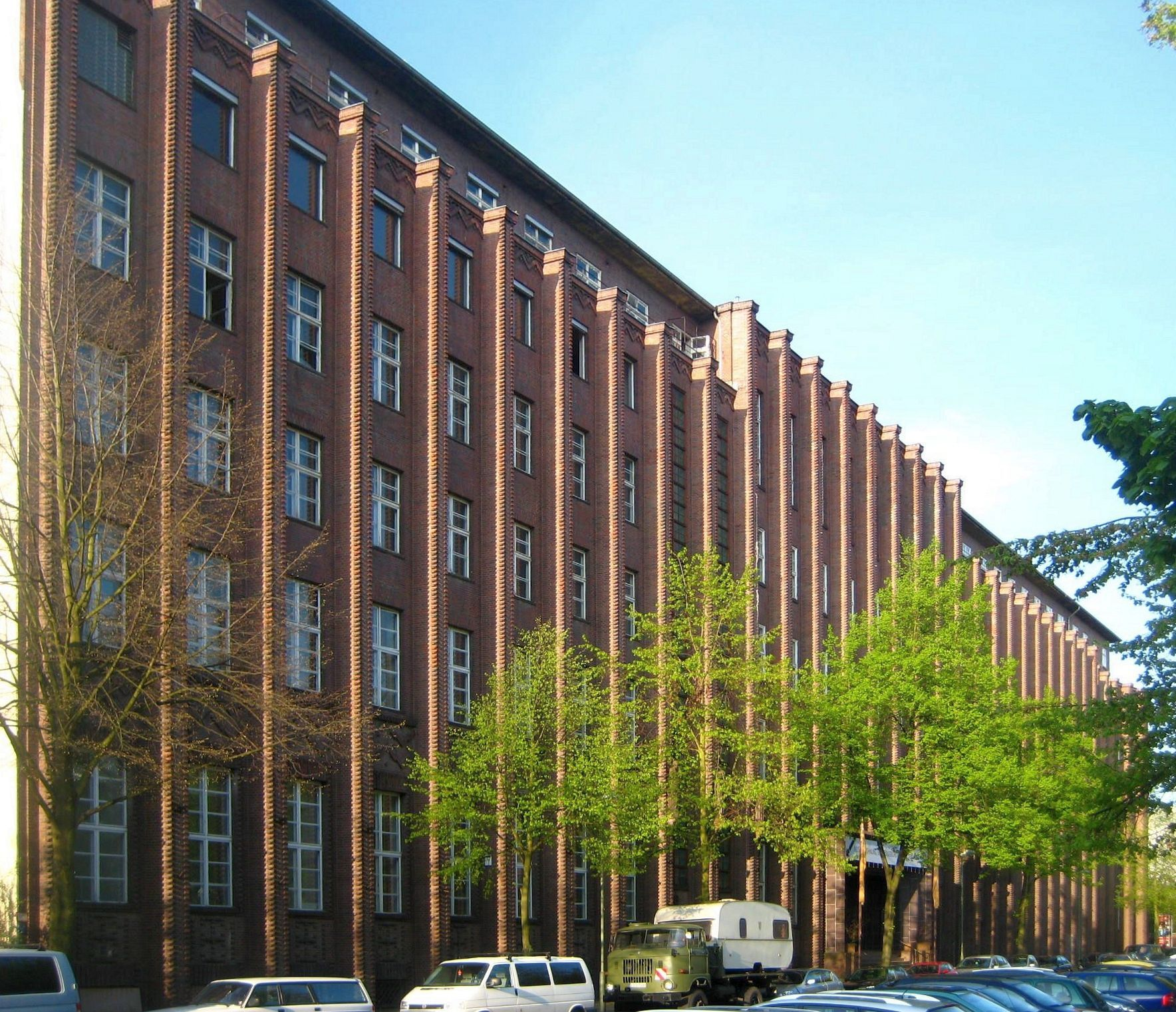 Ehemaliges zentrales Verwaltungsgebäude der Allgemeinen Ortskrankenkasse Berlin in der Rungestraße 3-6 in Berlin-Mitte, erbaut 1930-1932 vom Architekten Albert Gottheiner. Der langgestreckte, sechsstöckige Stahlskelettbau besitzt drei rückwärtige Flügel; einer liegt an der Wassergasse, zwei weitere bilden einen Hof, der einst mit Glasdach überdeckt war und als Schalterhalle genutzt wurde. Die spätexpressionistische Fassade mit blau-rotem Klinker besitzt schlanke Vorlagen, die die monumentale Wirkung steigern. Sie sind in den mittleren Achsen, wo sich das Portal befindet, bis zum zurückgesetzten sechsten Stockwerk hochgezogen. Das Portal schmücken beidseitig je drei Terrakottafiguren. In der DDR-Zeit befanden sich hier die Parteihochschule des ZK der SED und die Parteischule der SED-Bezirksleitung. Das Gebäude ist als Baudenkmal gelistet.